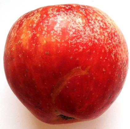 Äpfel der Sorte "Freiburger Prinzenapfel"